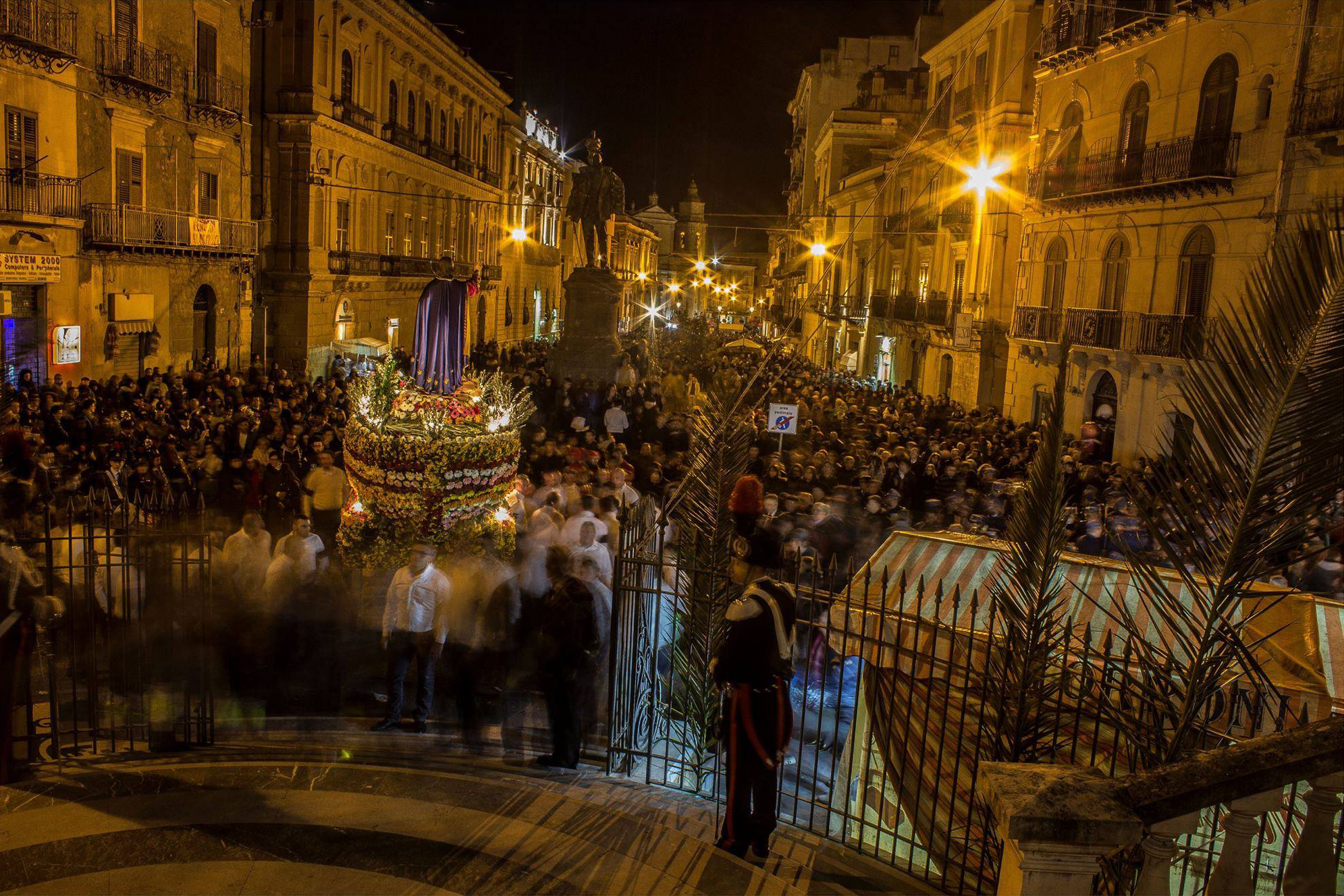 La barca infiorata al termine della processione Foto Giuseppe Sanalitro